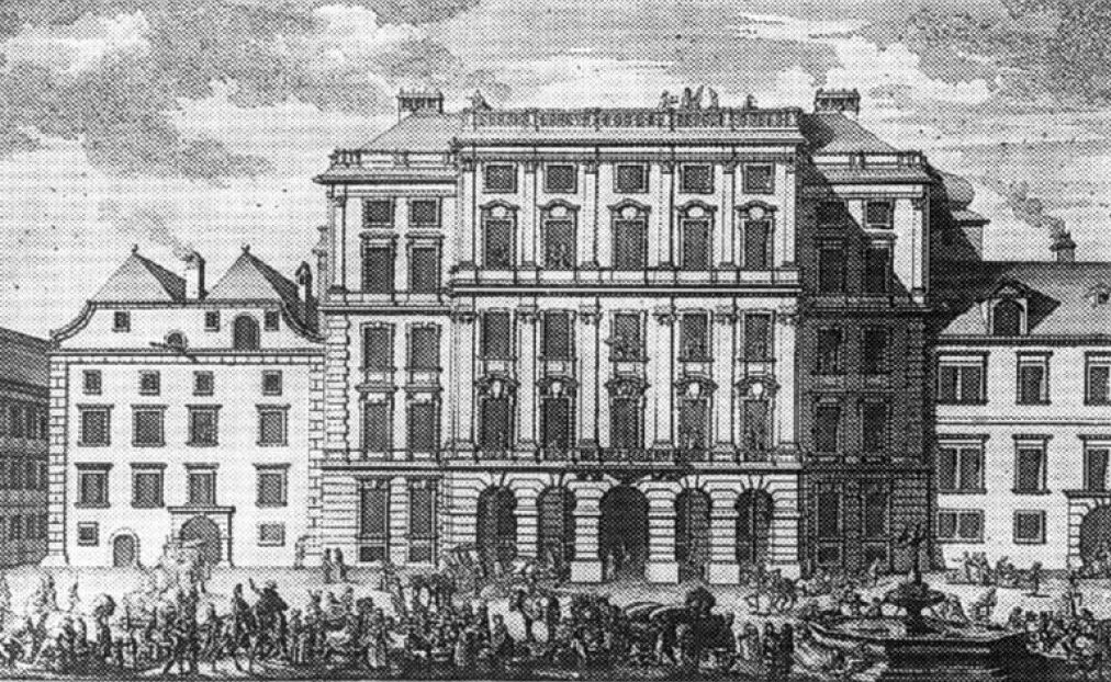 Die Mehlgrube am Neuen Markt in Wien, 1715